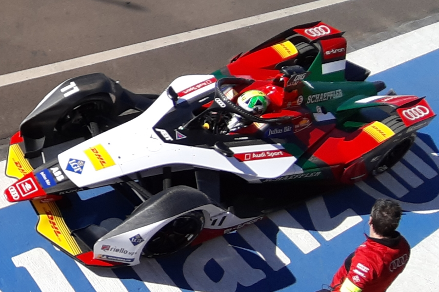 Lucas di Grassi beim Marrakesch E-Prix 2019